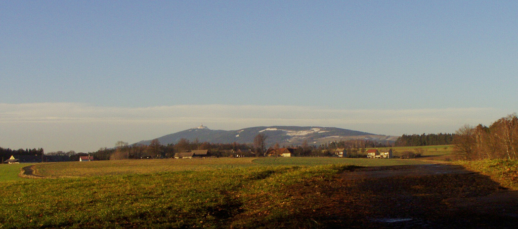 Vrchovina